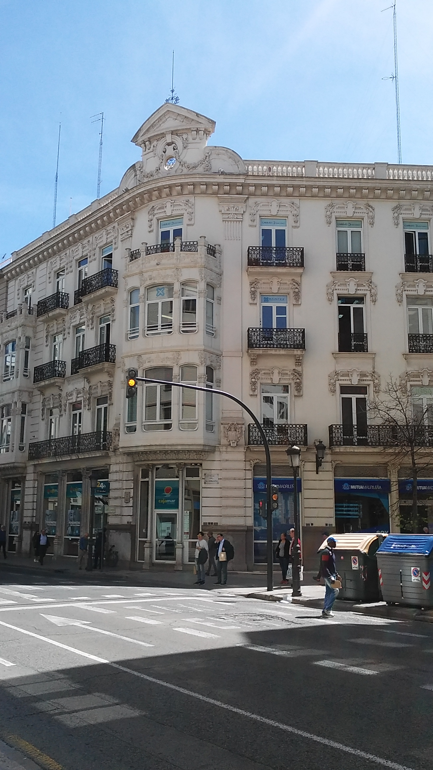 Edifici Lucini, en el carrer del Doctor Romagosa número 1, en Valéncia. Obra de l'arquitecte moderniste Ramón Lucini Callejo.